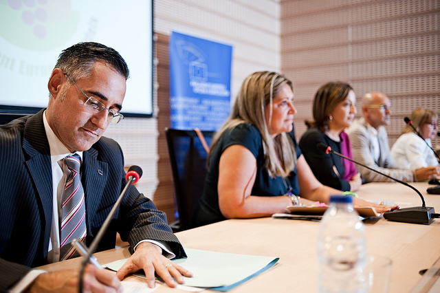 Ramon Tremosa participa a la jornada sobre la reforma de la PAC, a Lleida 30-9-2011